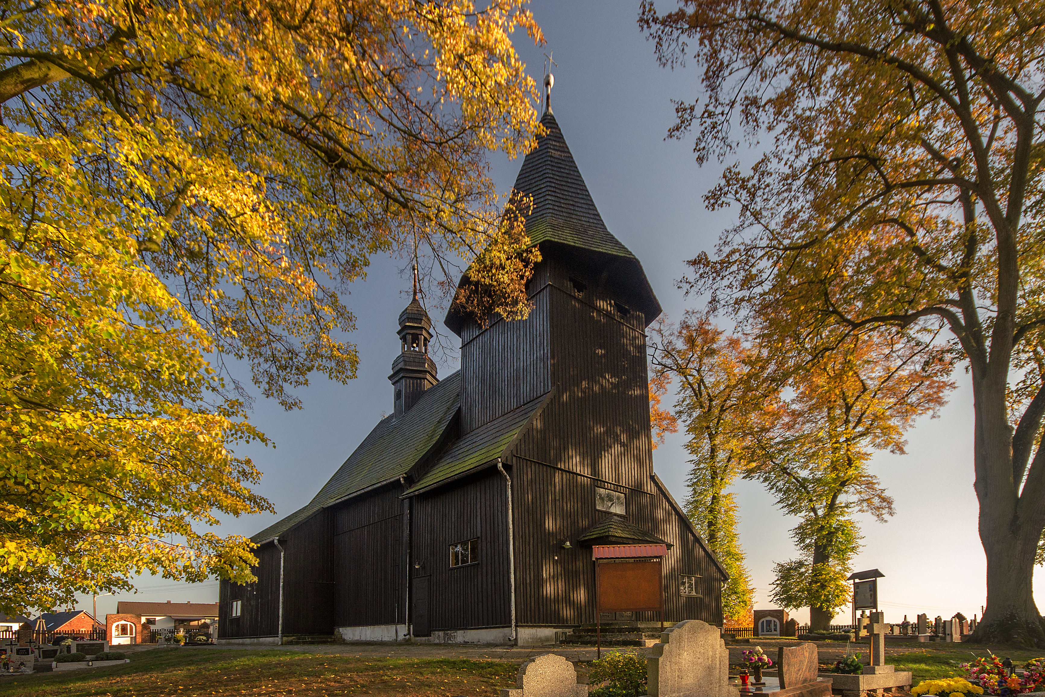 Laskowice, kościół fil. p.w. św. Wawrzyńca, 1689, 1856